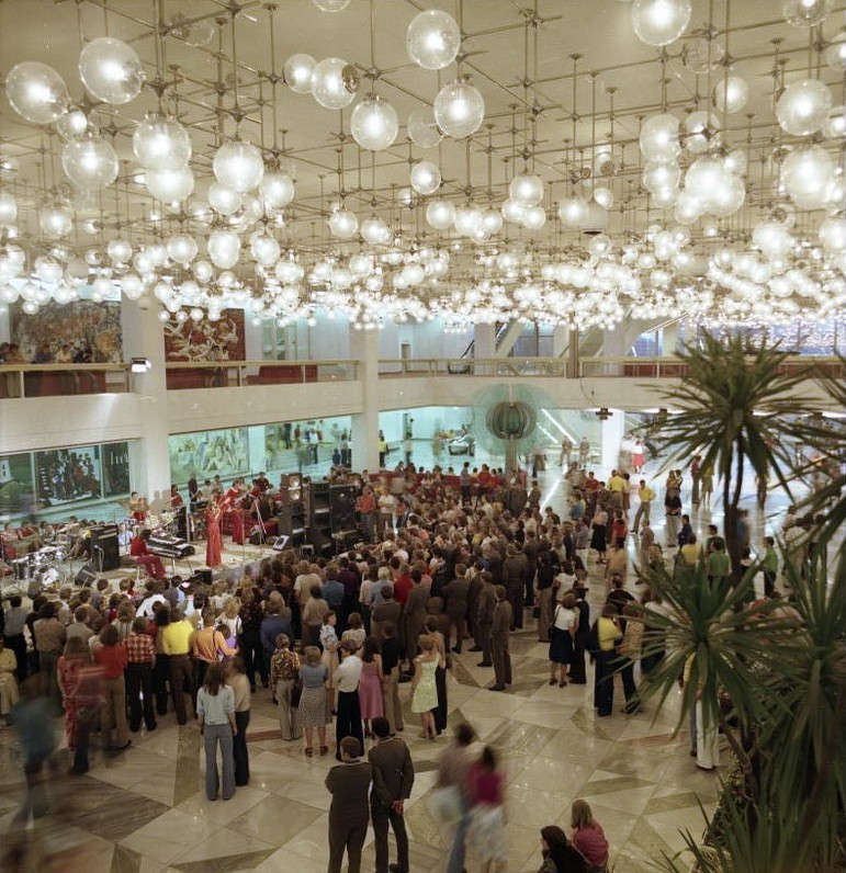 ADN-ZB / Sindermann / 6.7.76 / Berlin: Erster großer Jugendtanzabend im Palast der Republik Bekannte Ensembles und Solisten spielten am 26.6.76 im Großen Saal, im Hauptfoyer - unser Foto - in den Palastrestaurants und im Jugendtreff zum Tanz auf.